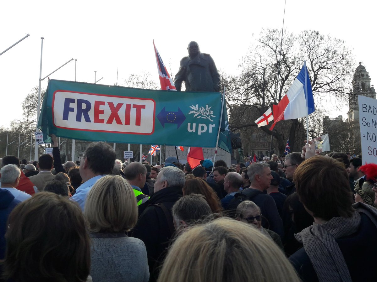 Français rassembler pour soutenir le Brexit à Londres le 29 Mars 2019